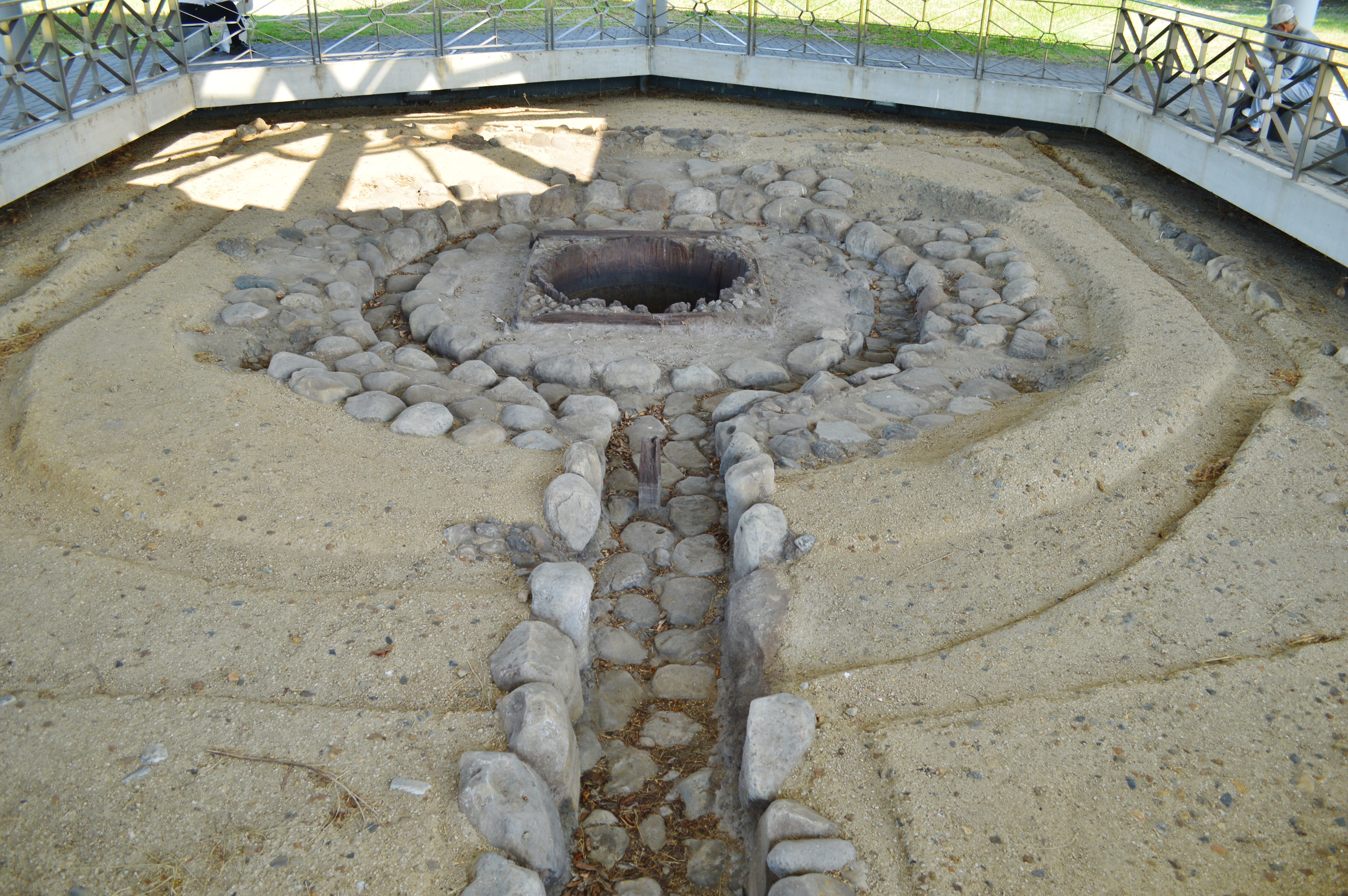 平城宮 造酒司跡 井戸